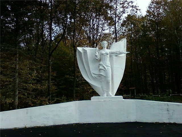 Еврейский мемориал в Броницком лесу (Дрогобычского р-на Львовской области)